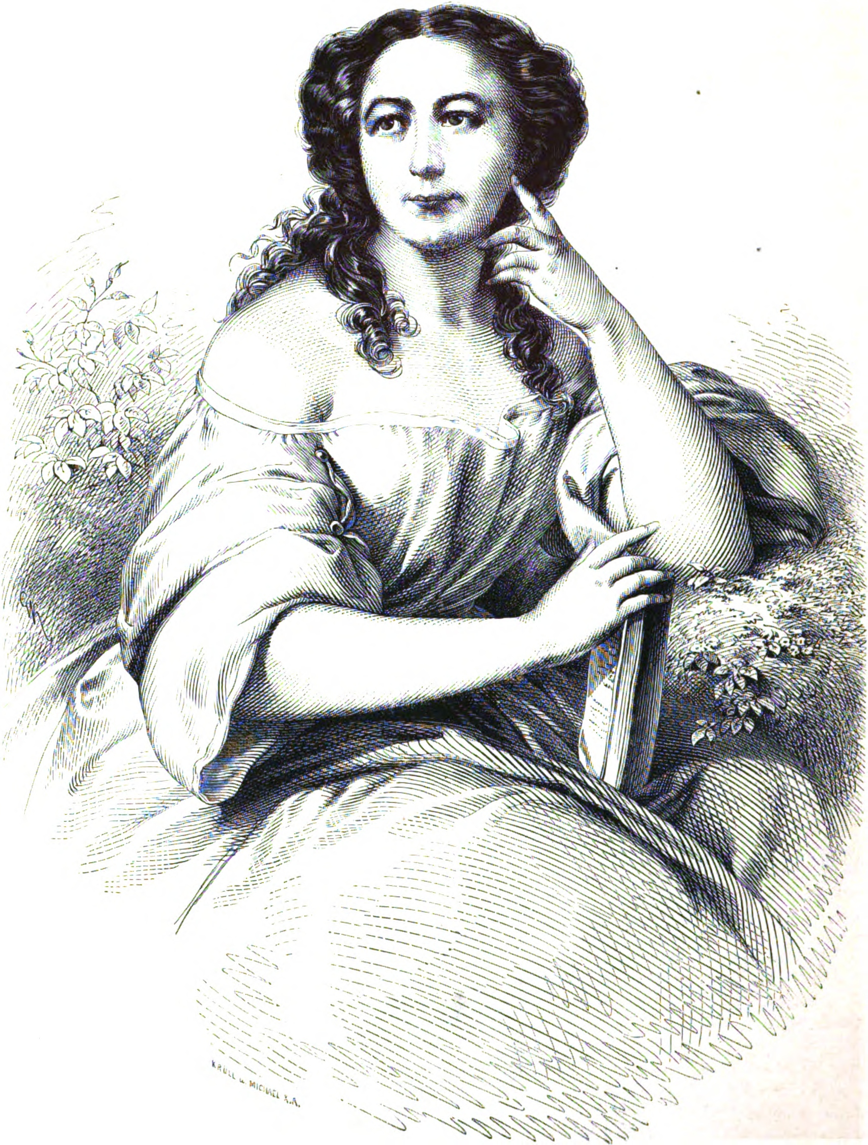 Dora d'Istria, rumänisch-albanische Schriftstellerin im 19. Jh.